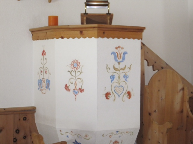 Kanzel in der reformierten Kirche in S-charl (bei Scuol im Unterengadin)